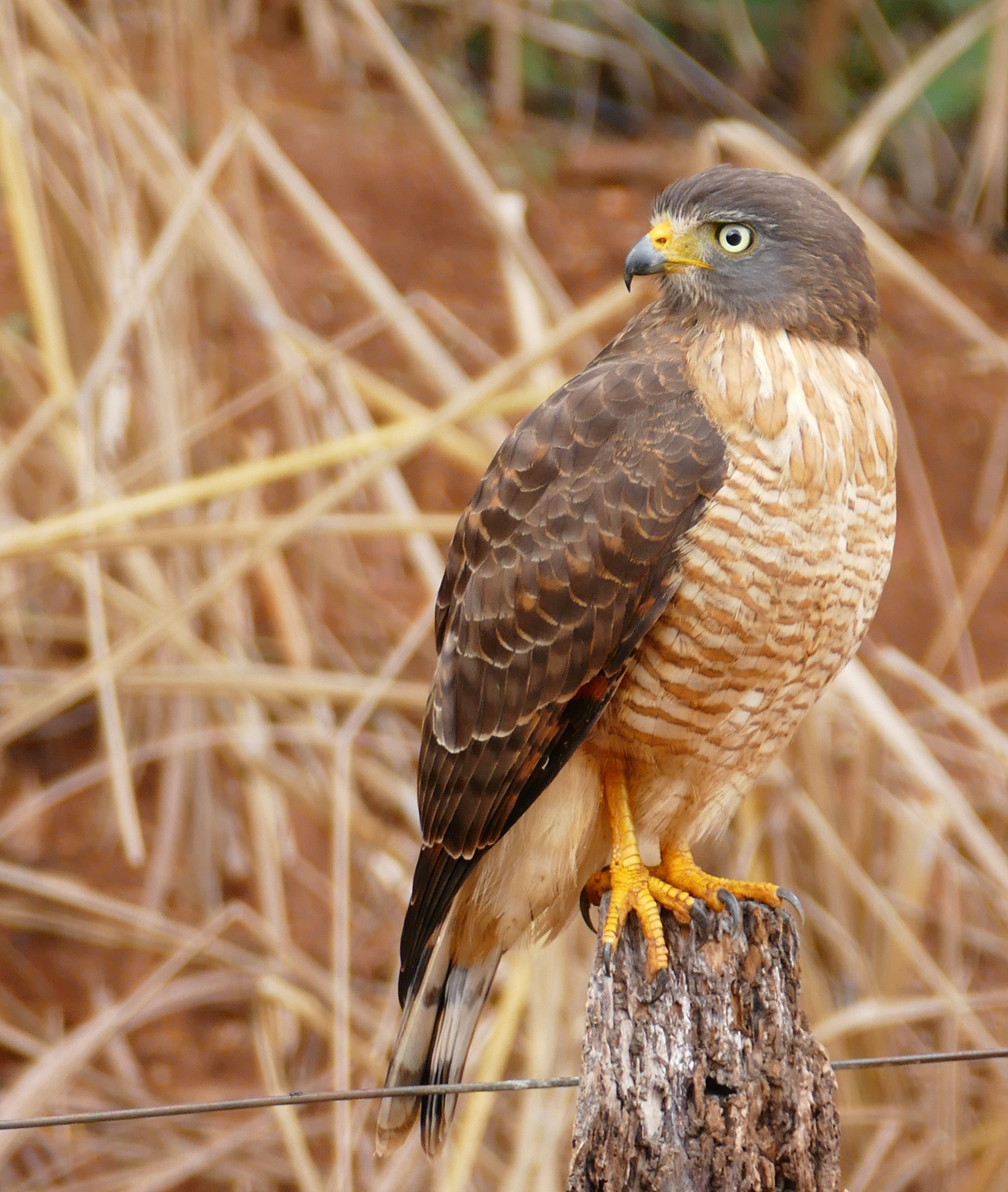 Transpantaneira, Poconé, Mato Grosso, BRAZIL